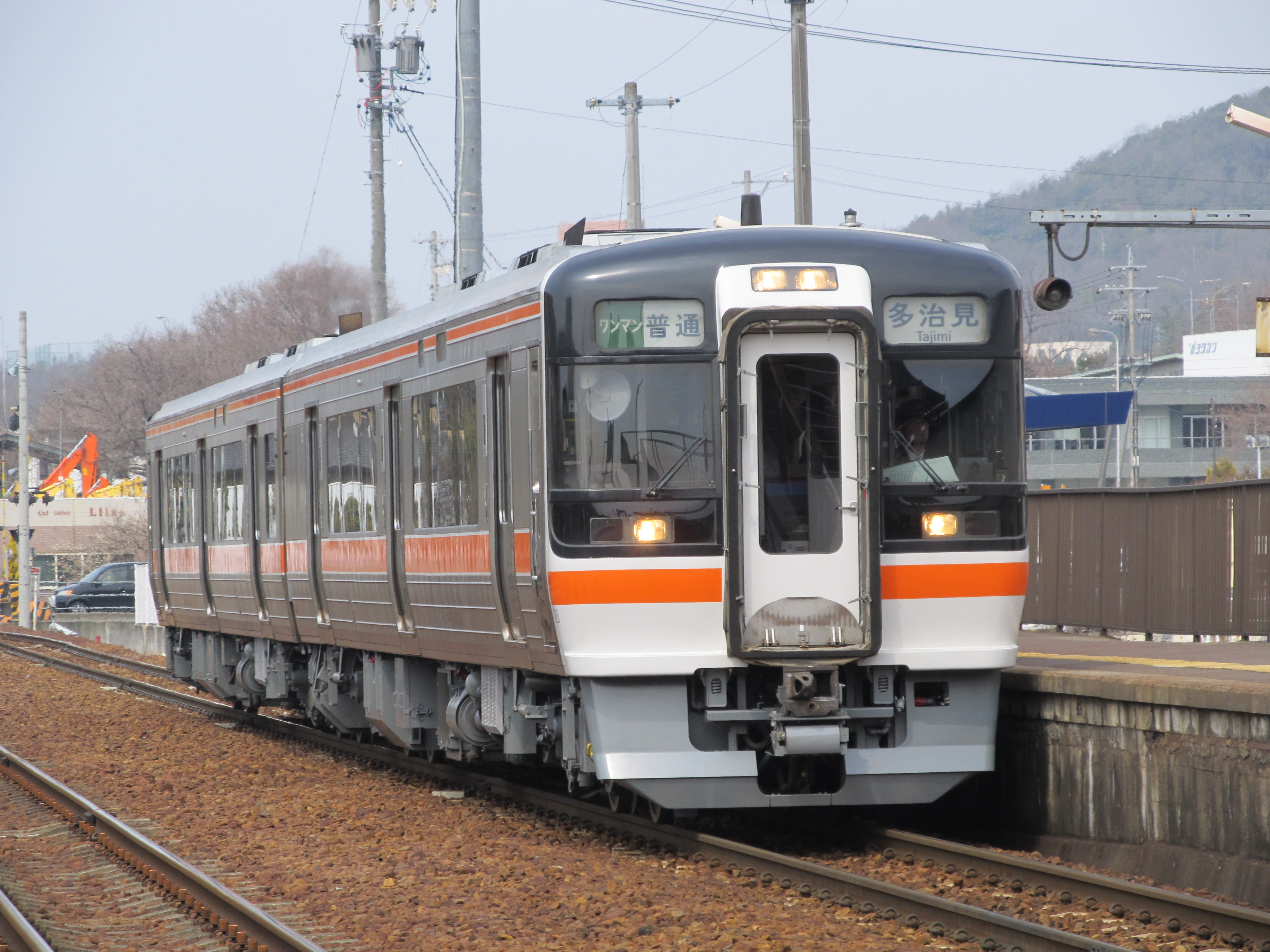 JRキハ75形気動車によるワンマン普通列車 多治見行。小泉駅にて。